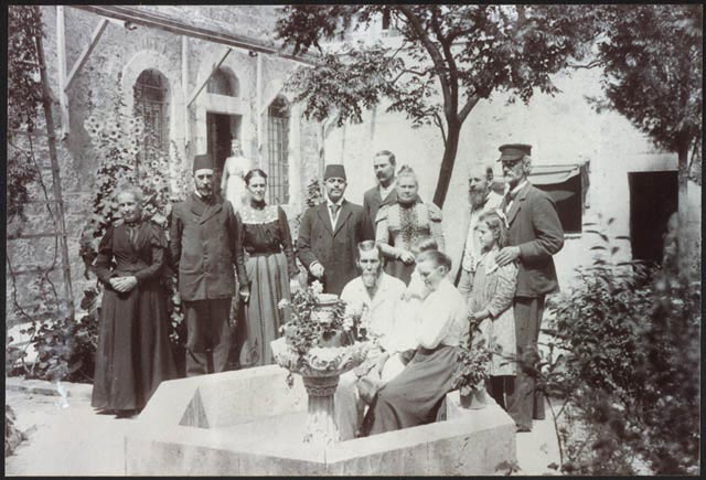 אמריקן קולוני מקור: ספריית הקונגרס